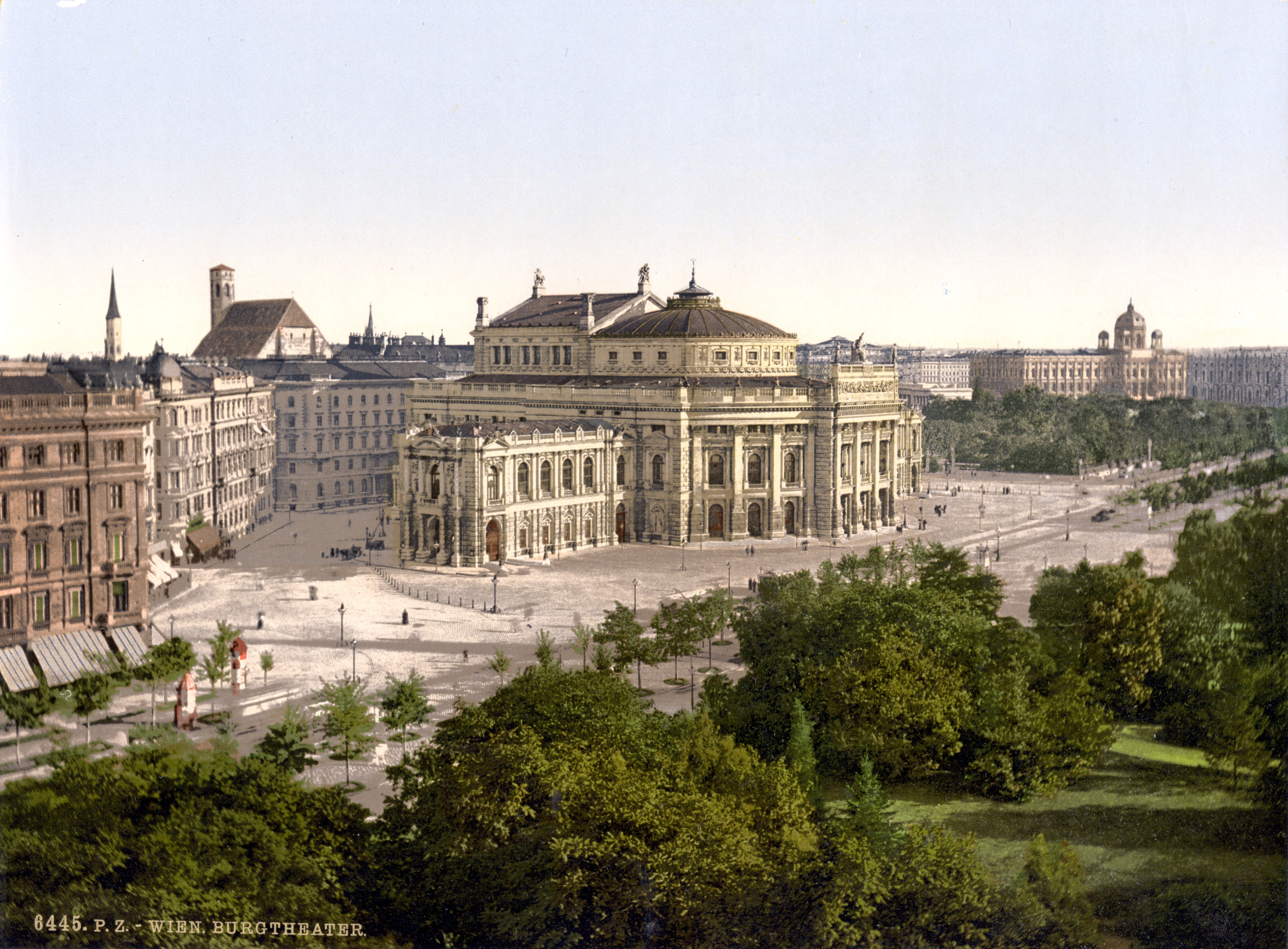 Wien Burgtheater zwischen 1890 und 1900 - Google Maps - Google Earth